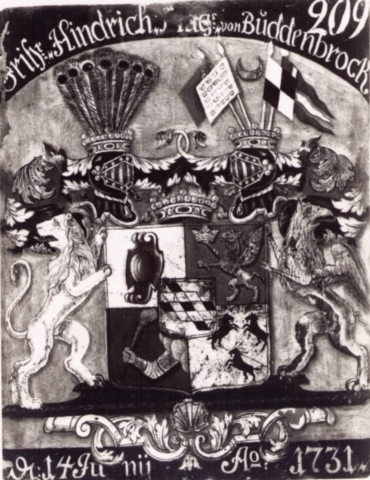 Wappen für den königlich schwedischen Generalmajor (seit 1739 Generalleutnant der Infanterie) Baron Henrik Magnus Buddenbrock [Friherre Hindrich Magnus von Buddenbrock] (1685–1743), anlässlich der Introduzierung auf dem Ritterhaus (Riddarhus) Stockholm bei der Freiherrenklasse (Friherrligt stånd) am 14. Juni 1731 unter Nr. 209. -Herzschild: Stammwappen Buddenbrock. 1. Helm: Stammwappenzier (hier die älteren Pfauenfedern). 2. Helm wohl für militärische Verdienste (Kommandoflaggen, dazwischen liegender Halbmond).